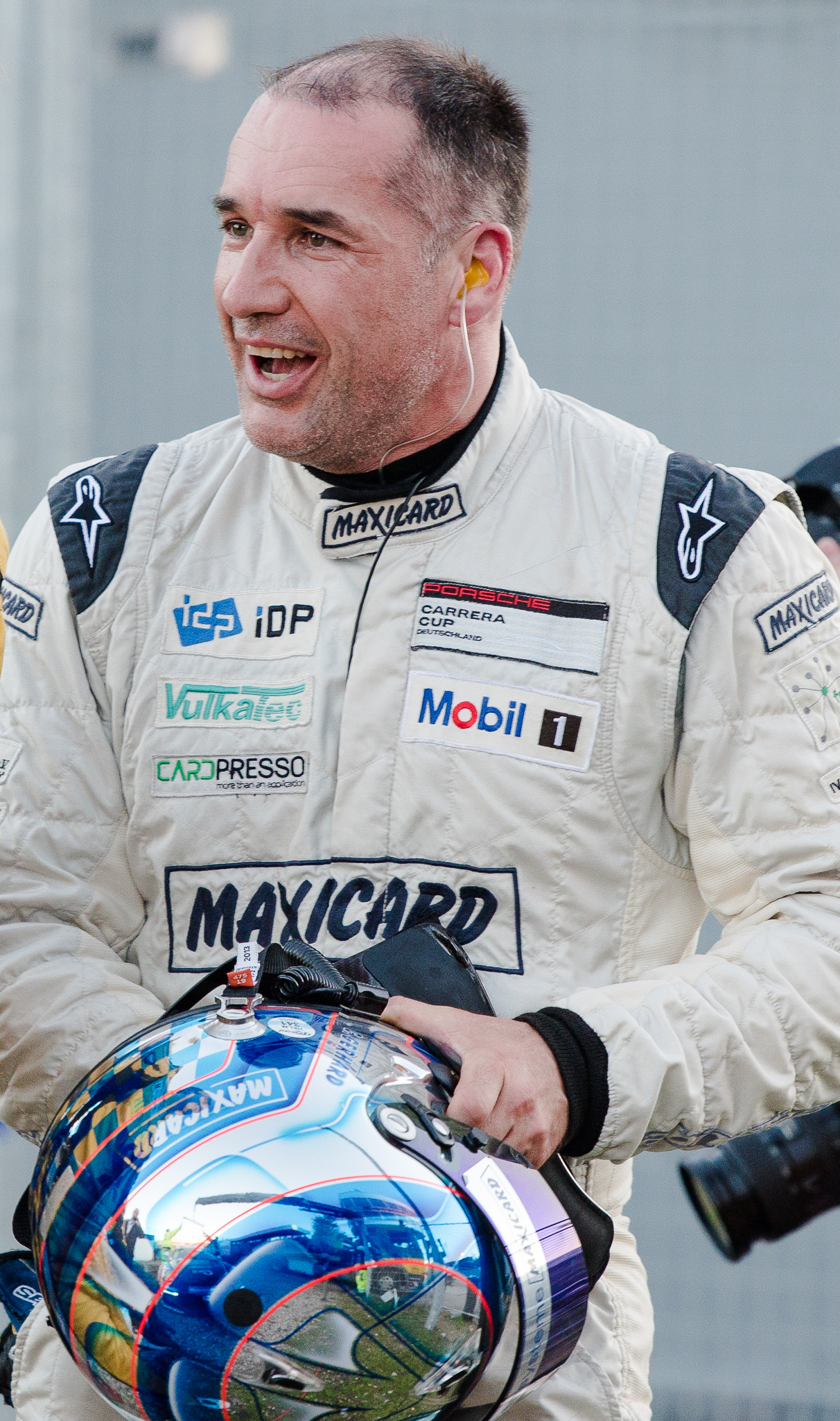 Christopher Gerhard,Hockenheimring,Motorsport,Porsche Carrera Cup Deutschland